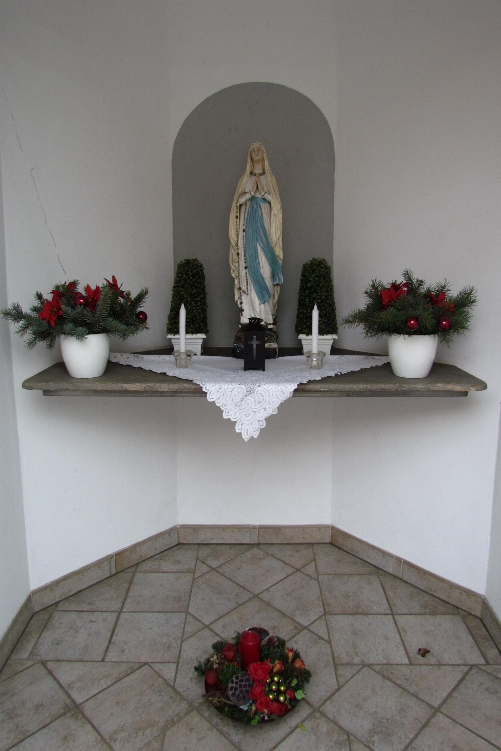 Kirchen und Kapellen in Heinsberg